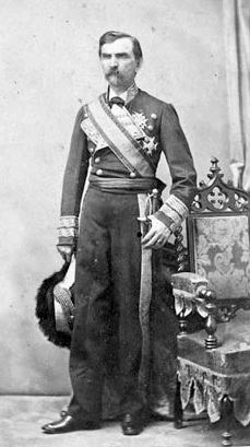 Grabado en blanco y negro que representa al general español Domingo Dulce y Garay (1808-1869), que fue un militar destacado en el reinado de Isabel II y también capitán general de Cuba y de Cataluña.